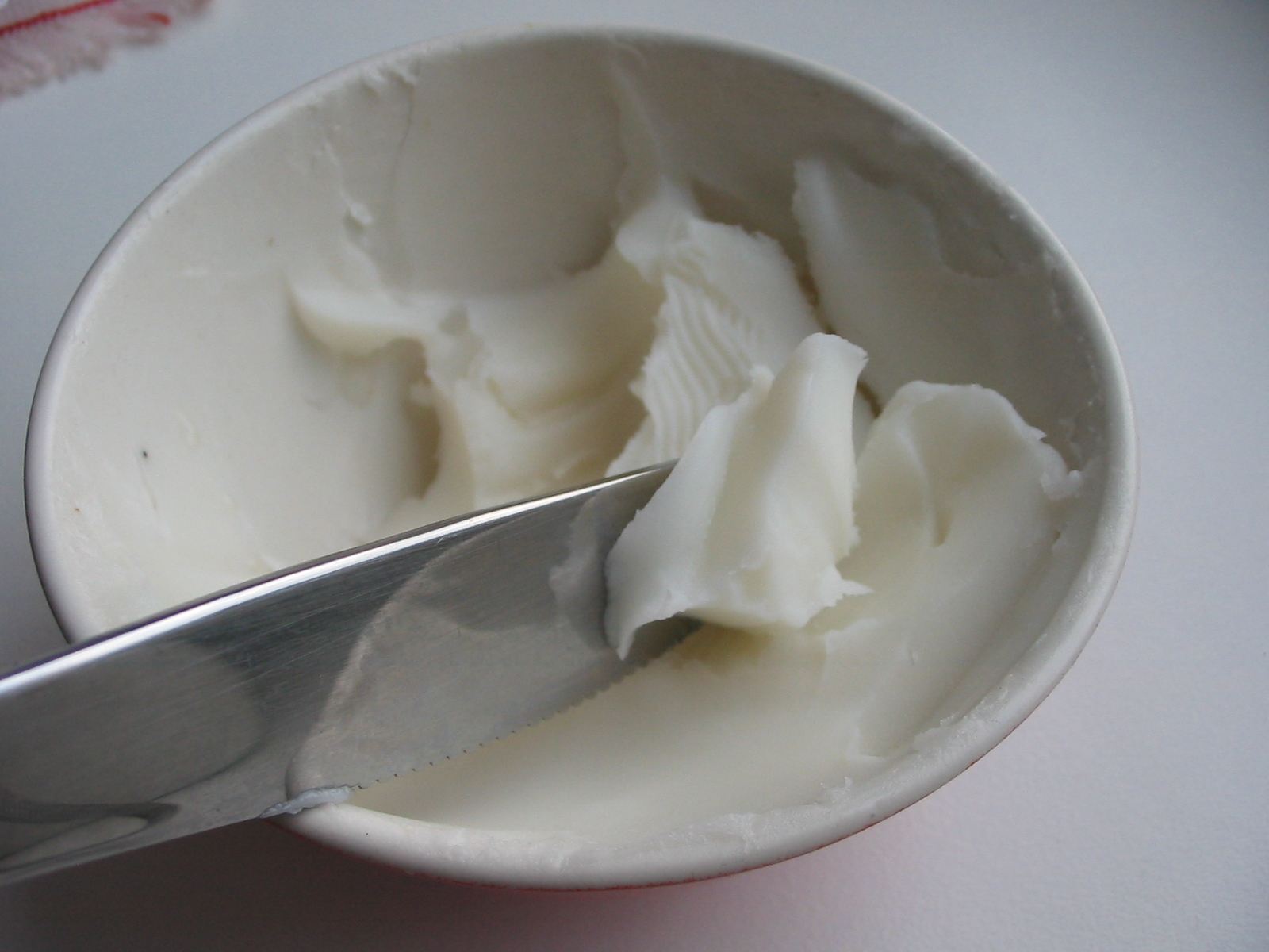 Свинний смалець Pork smalets